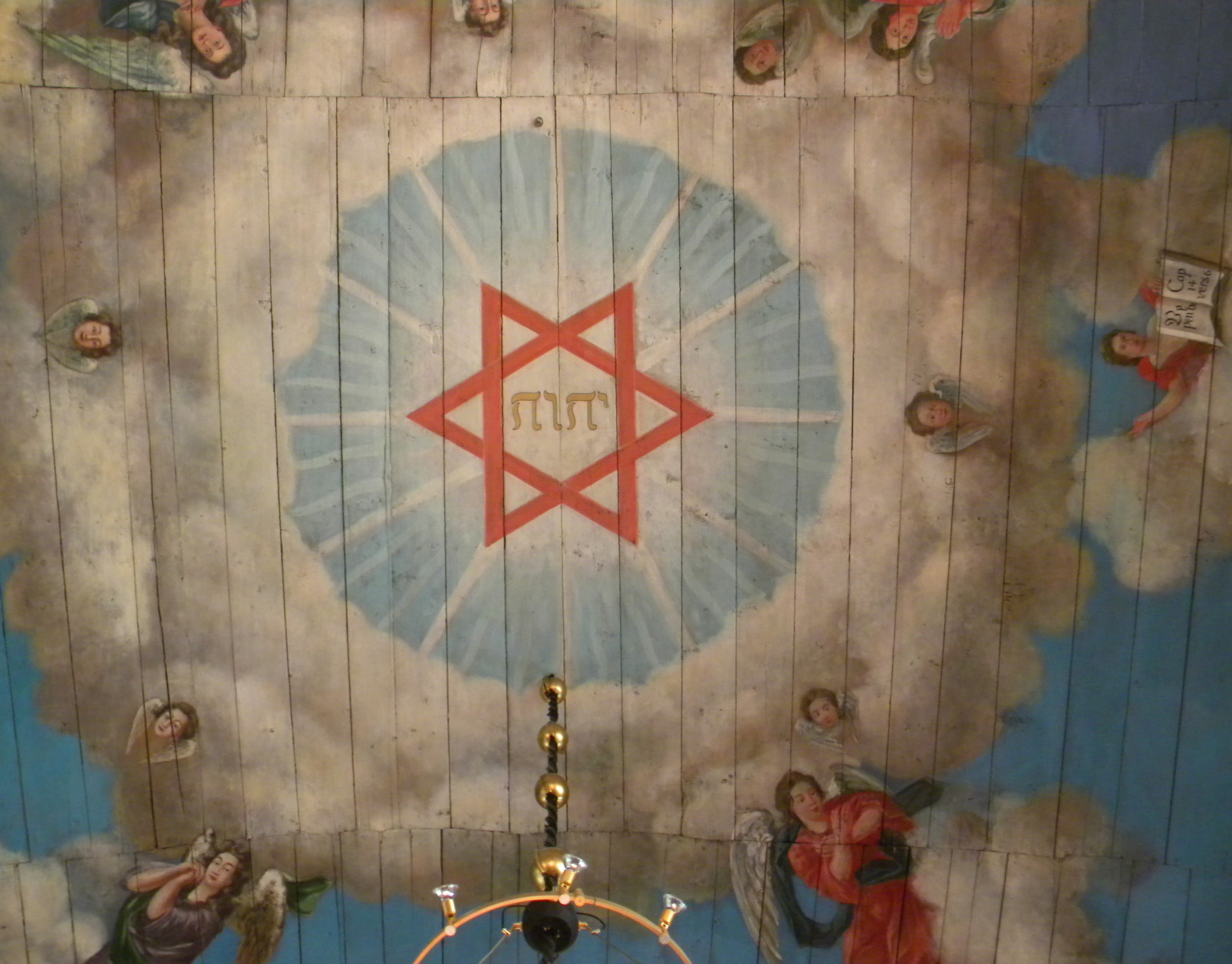 Takmålning från 1750 med tetragrammet JHWH i Lerums kyrka